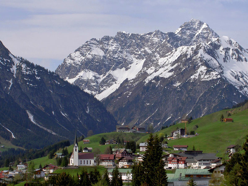 Blick auf Hirschegg (Ortsmitte) im Kleinwalsertal, dahinter der Große Widderstein (2533 m).